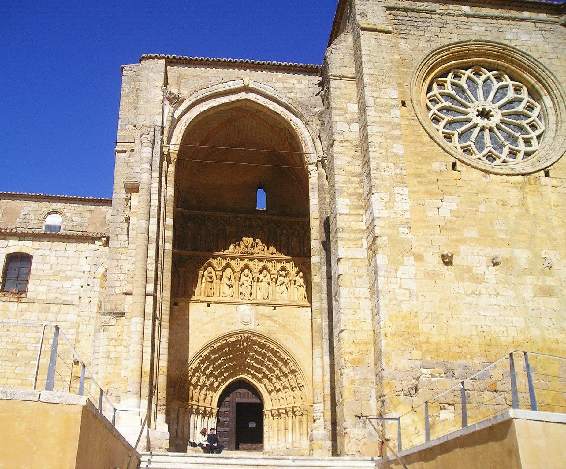 Aspecto general de la iglesia de Sta. María la Blanca de Villalcázar de Sirga en la prov. de Palencia